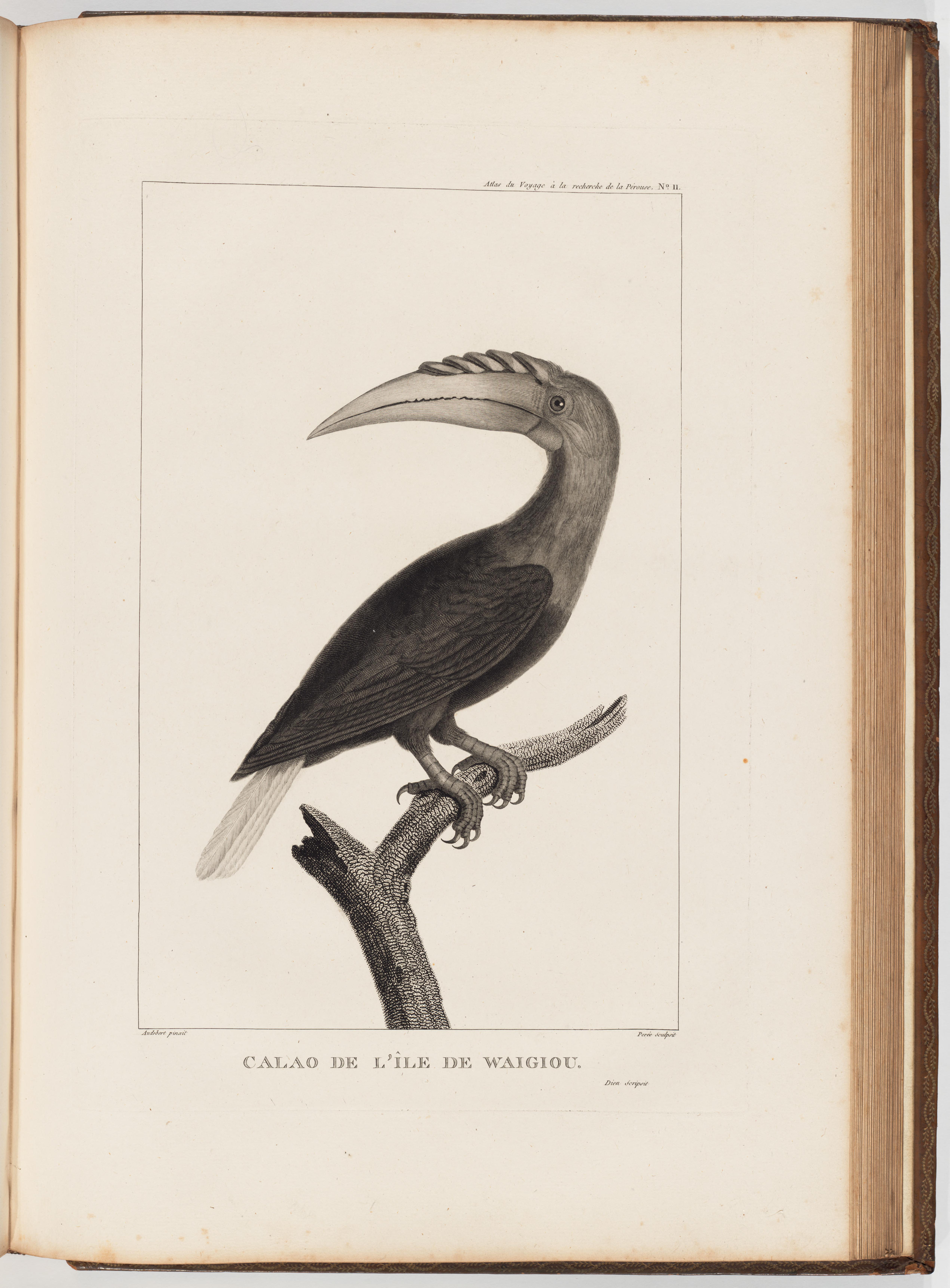 Voyage de La Pérouse autour du monde /publié conformément au décret du 22 avril 1791, et rédigé par L.A. Milet-Mureau.